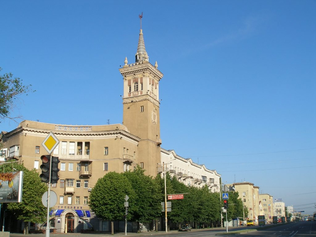 Житловий будинок що формує в'їзд з боку шляхопроводу, архітектори І.Л. Козлінер, Л.Я. Гершович, Запоріжжя, просп. Леніна, 175